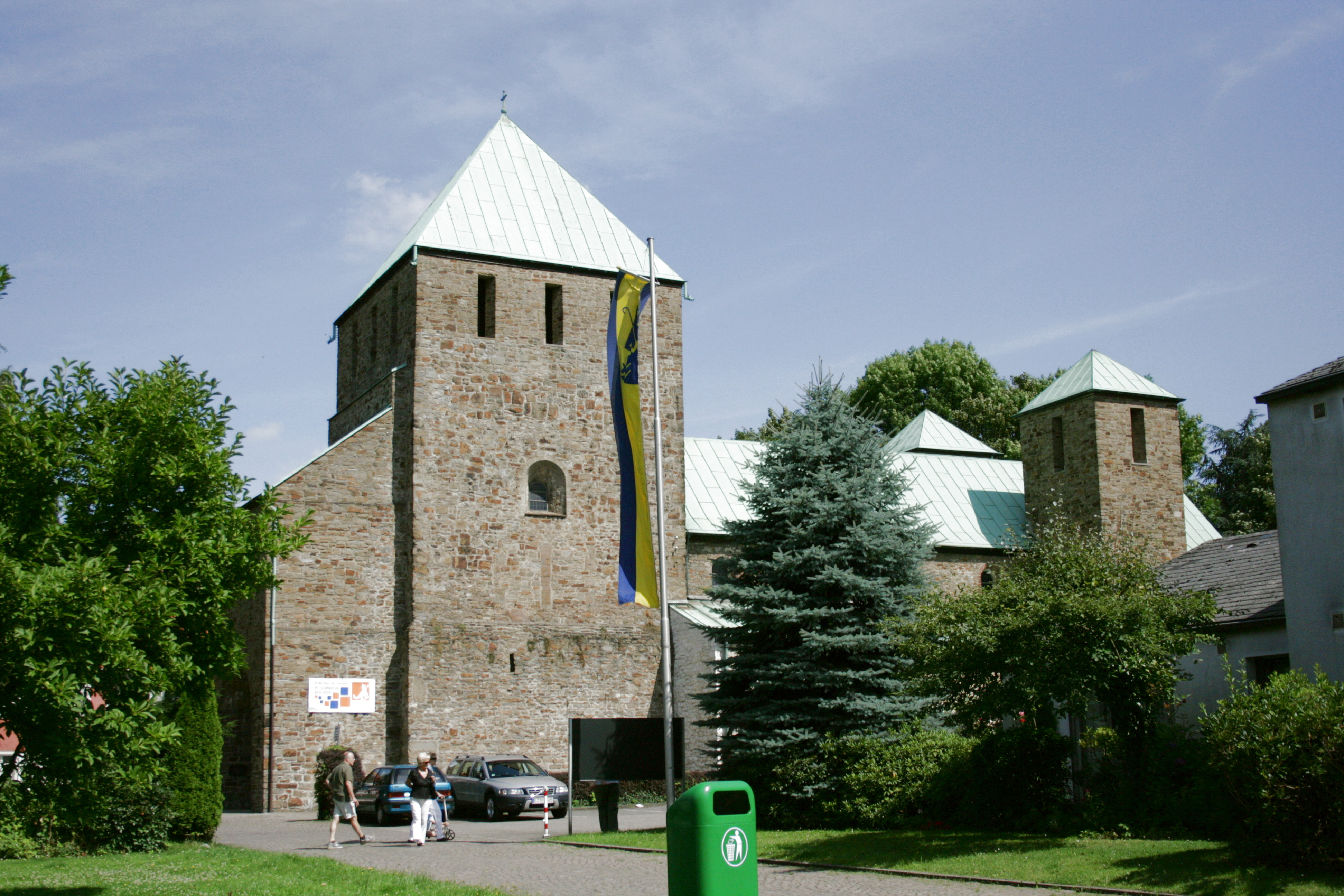 Sankt Lucius in Essen-Werden